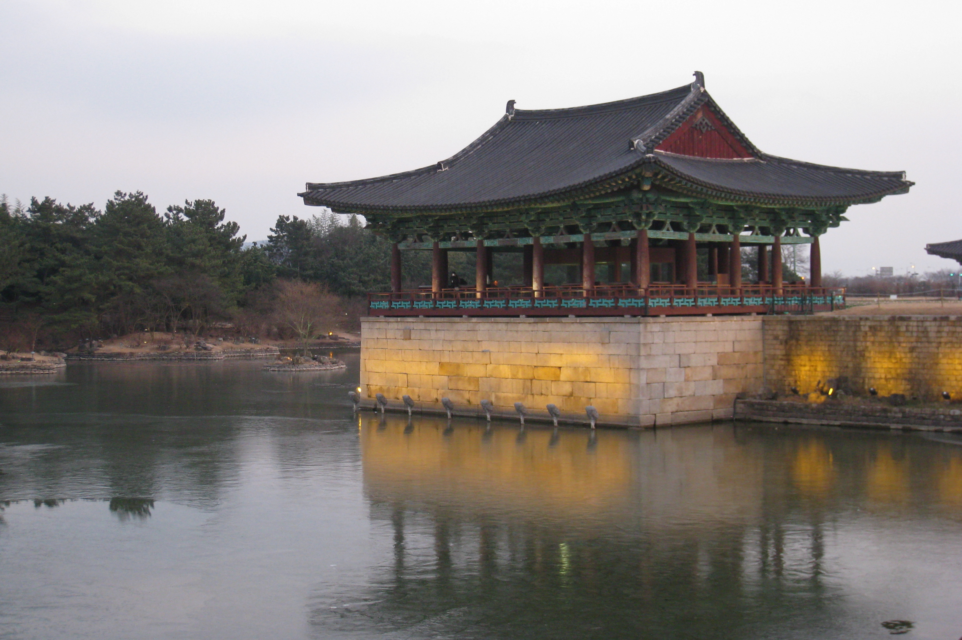 Anapji Pond, Gyeongju, Korea